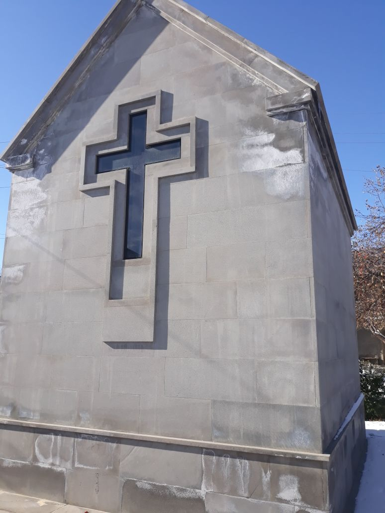 Սուրբ Նարեկ մատուռ, Արագածոտնի մարզ, Վարդենիս գյուղ